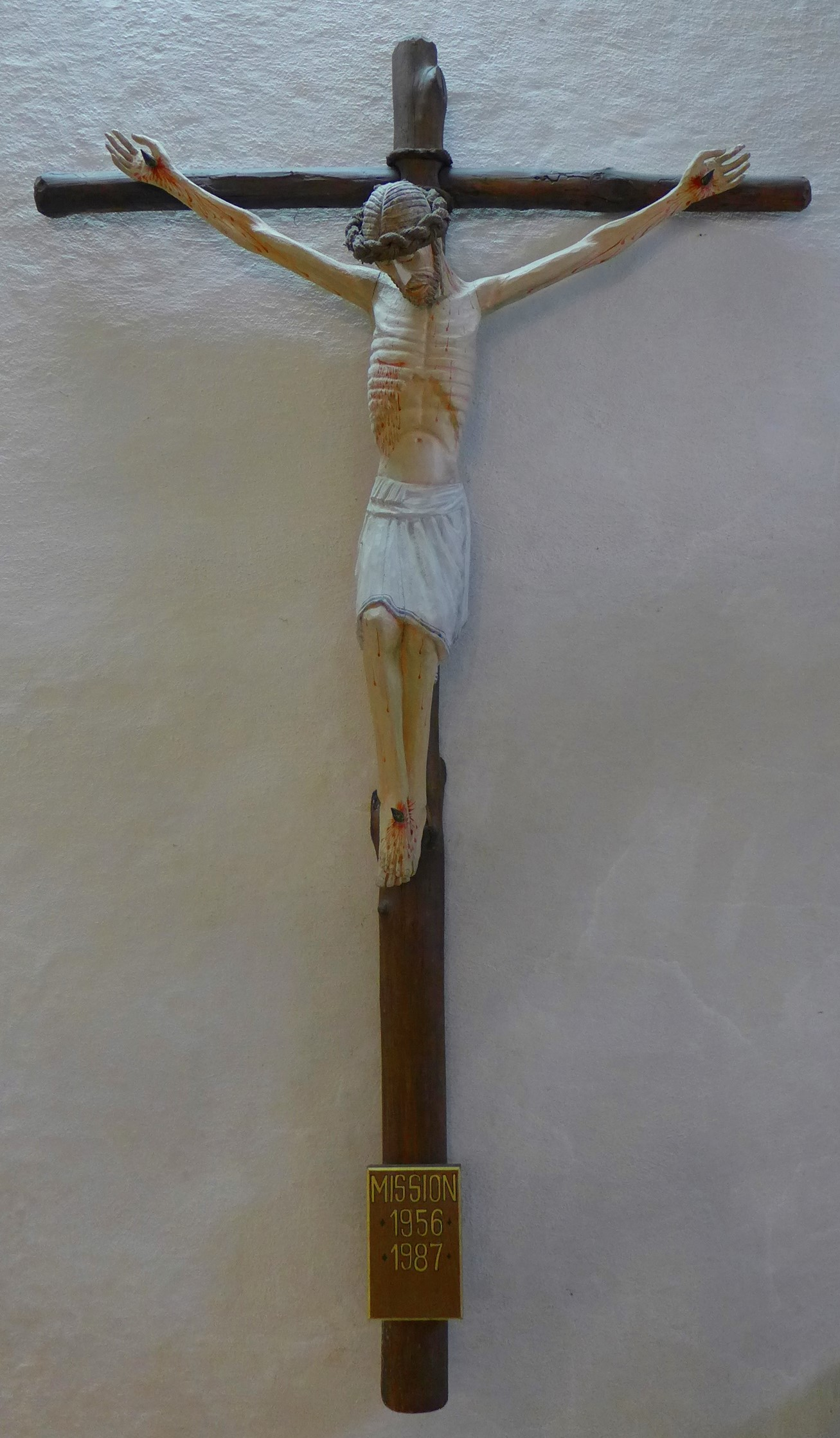 St. Josef und St. Wendelin (Diefflen), Missionskreuz, Kopie des "Dévôt-Christ de Perpignan"